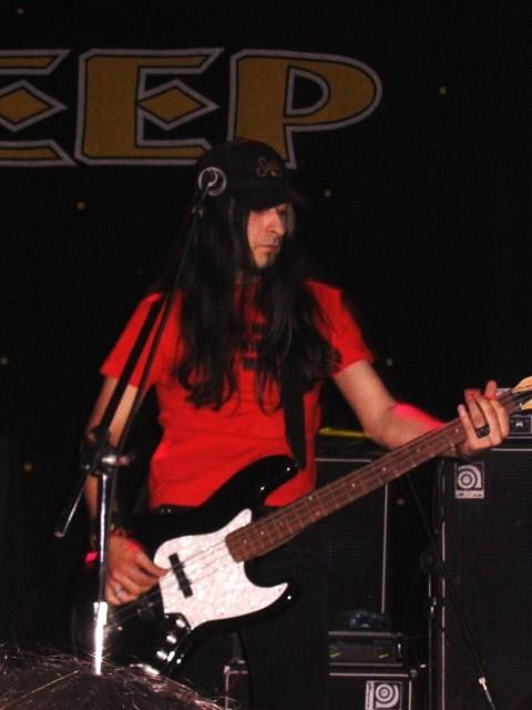 Ο μπασίστας και ιδρυτής των Hattie Green, Nikos Kastanas